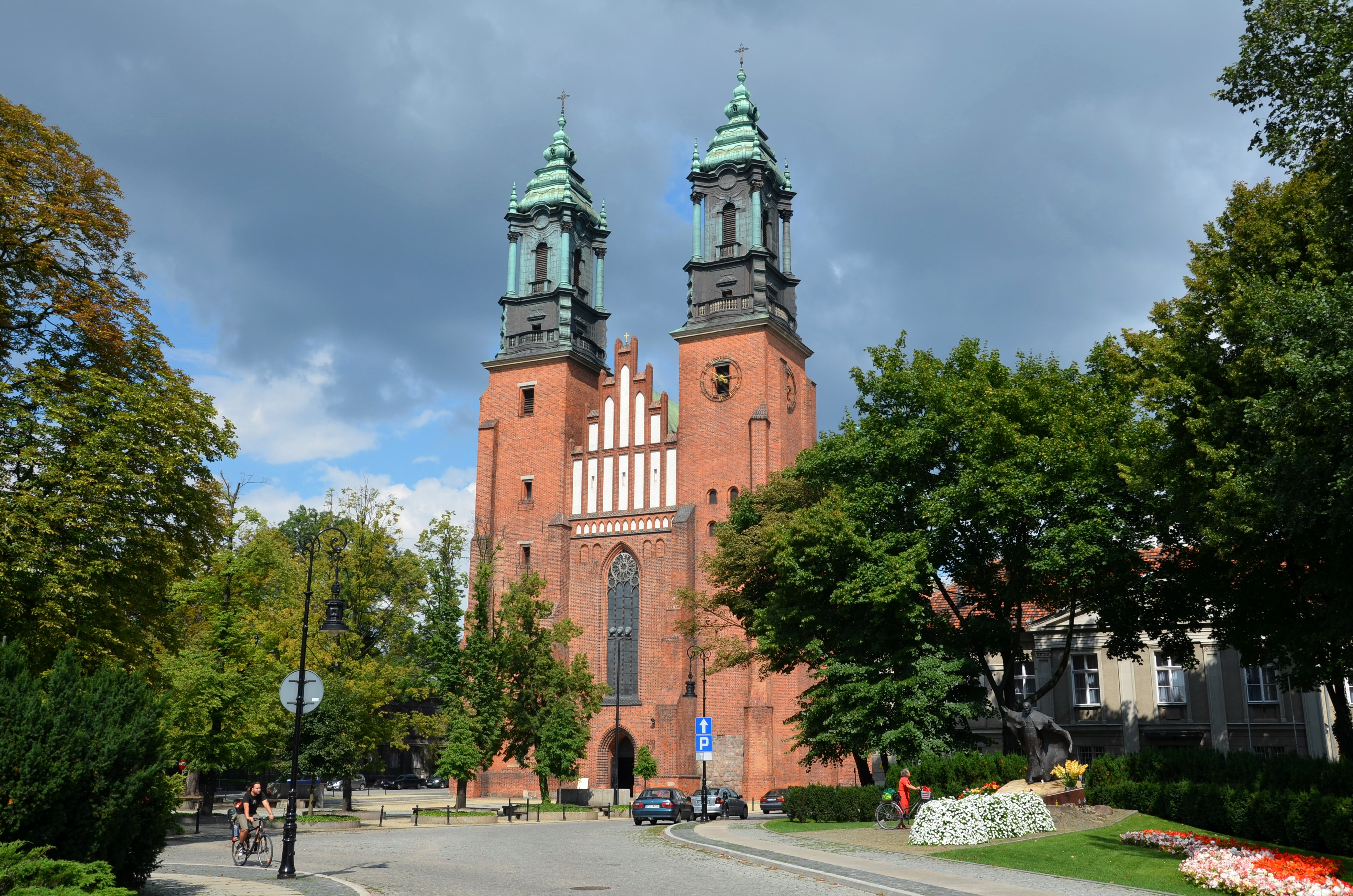 Poznań, katedra p.w. śś. Piotra i Pawła, 2 poł. XIII, XIV, XVIII, 1954-1956